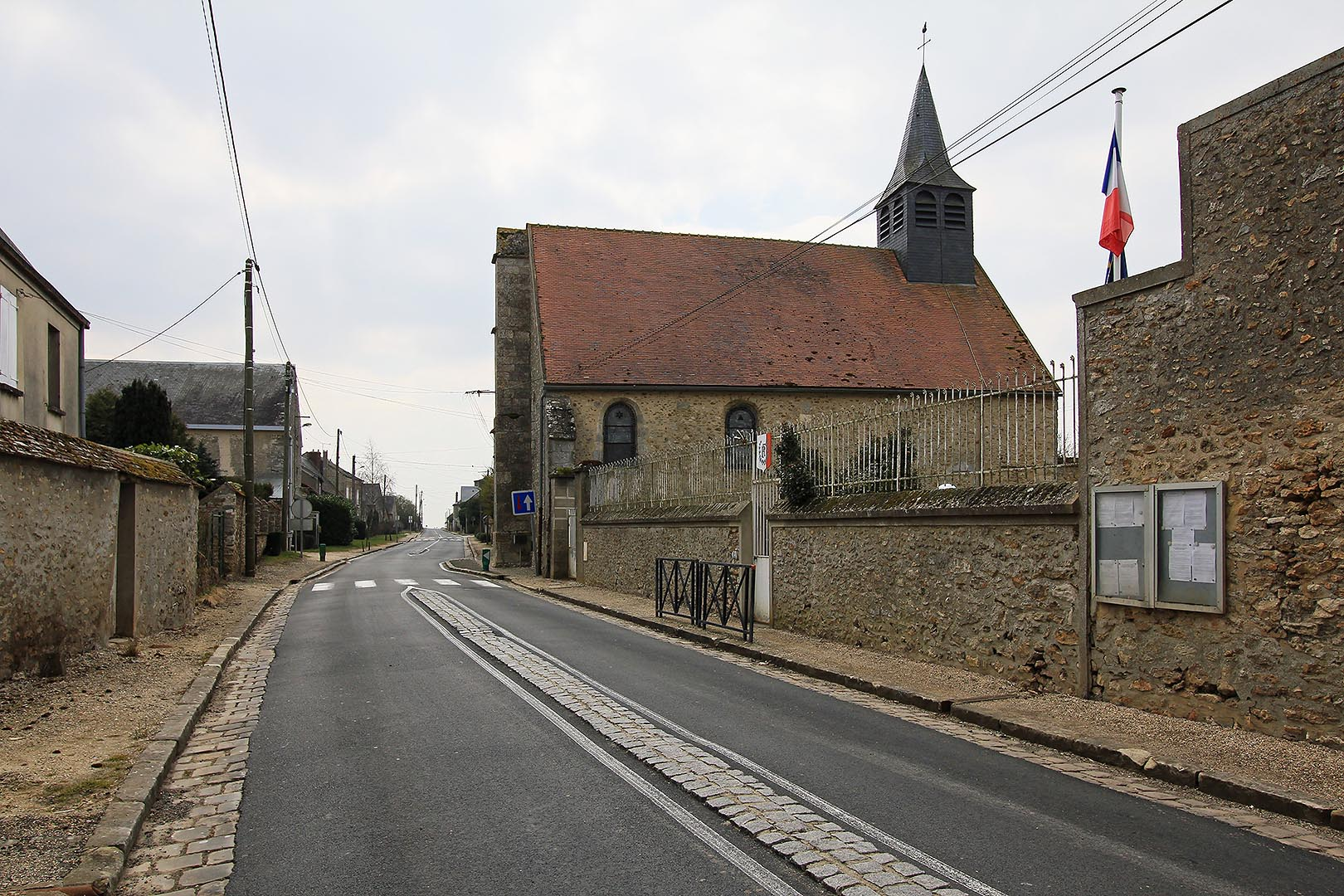 église de Chatignonville